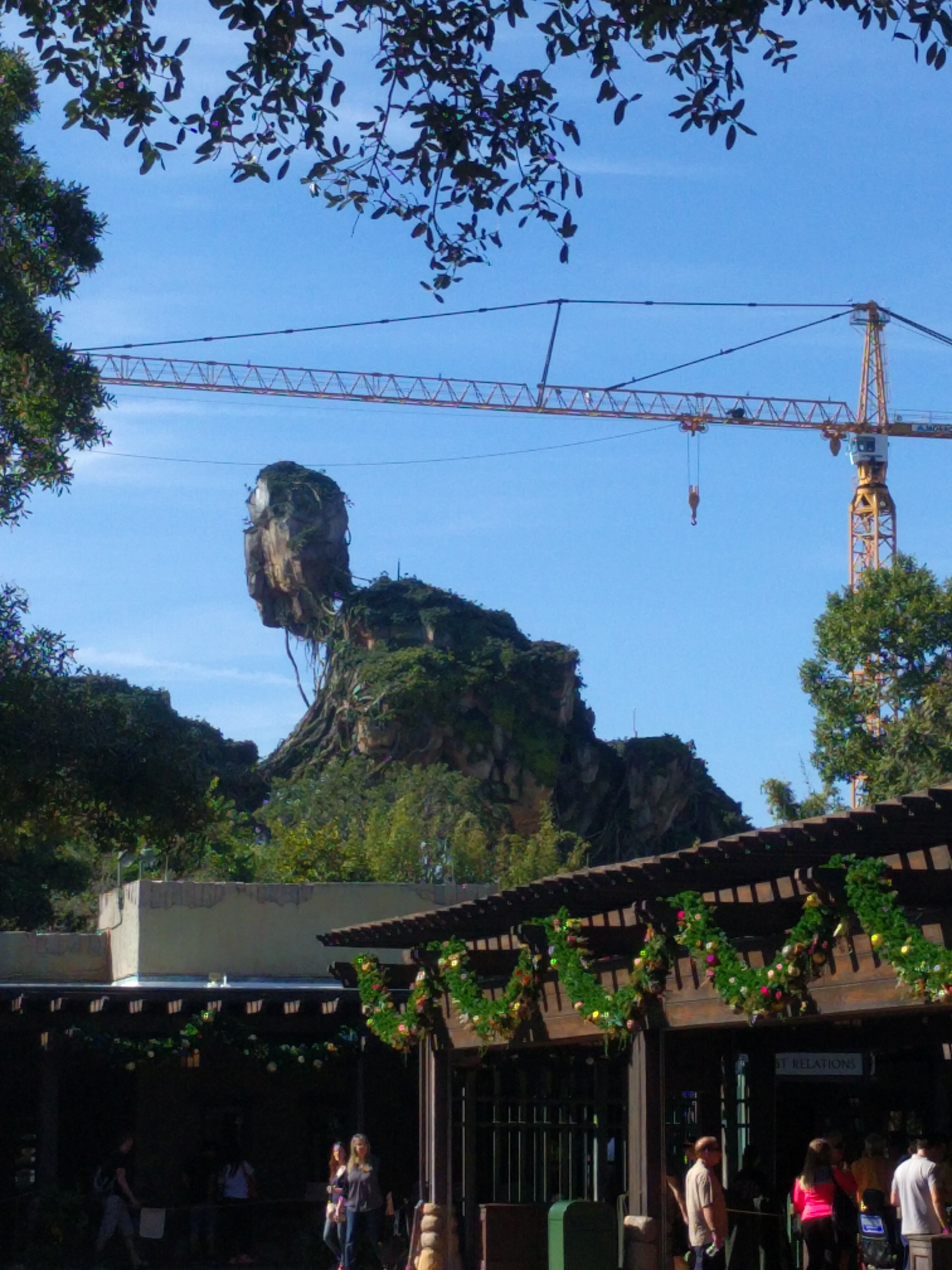 12-15-2016 Pandora